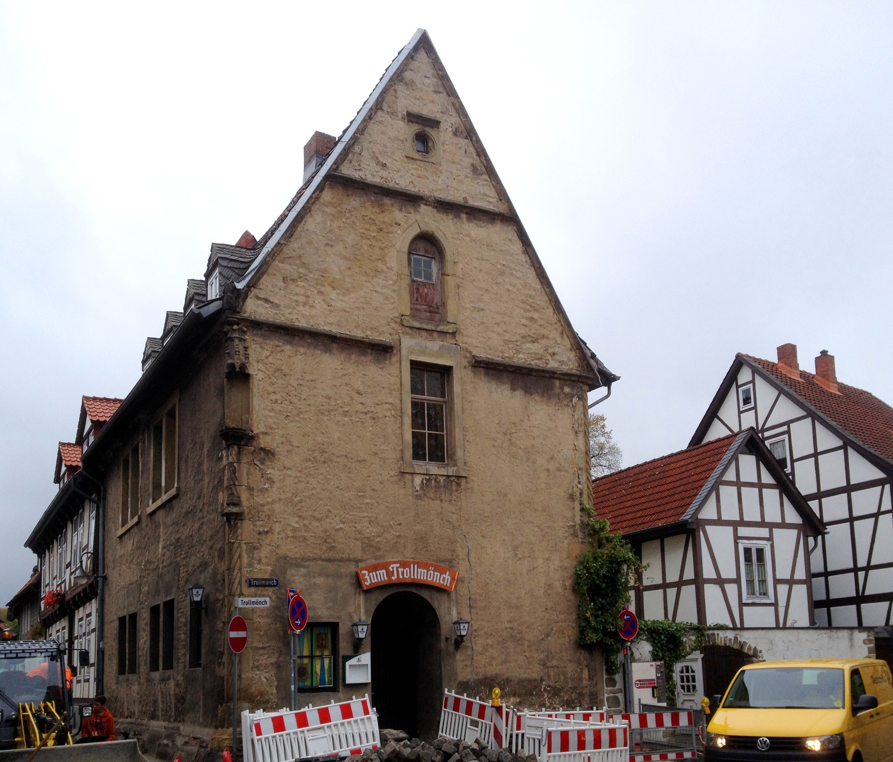 Trollmönch, ehemaliges Konventshaus der Alexianer in Goslar